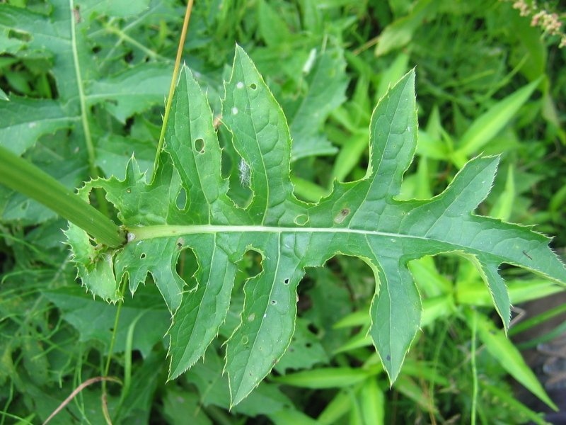 Kohl-Kratzdistel (Cirsium oleraceum), Rostock